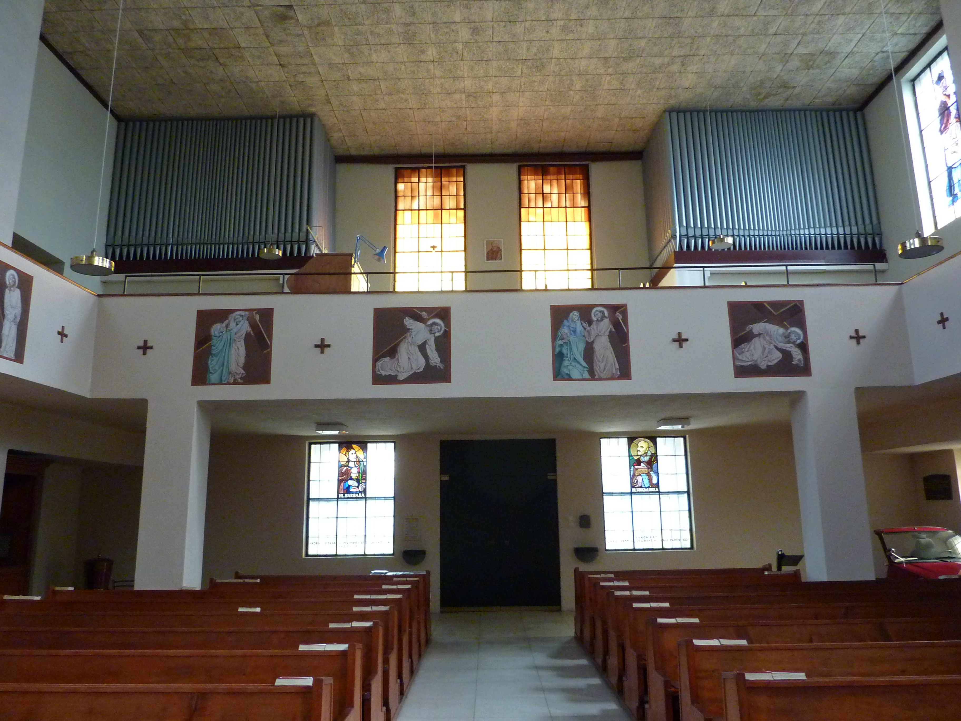 Pfarrkirche hl. Christophorus, Sigmundsherberg, Niederösterreich - Orgelempore (Auto-Teil rechts unter der Empore)